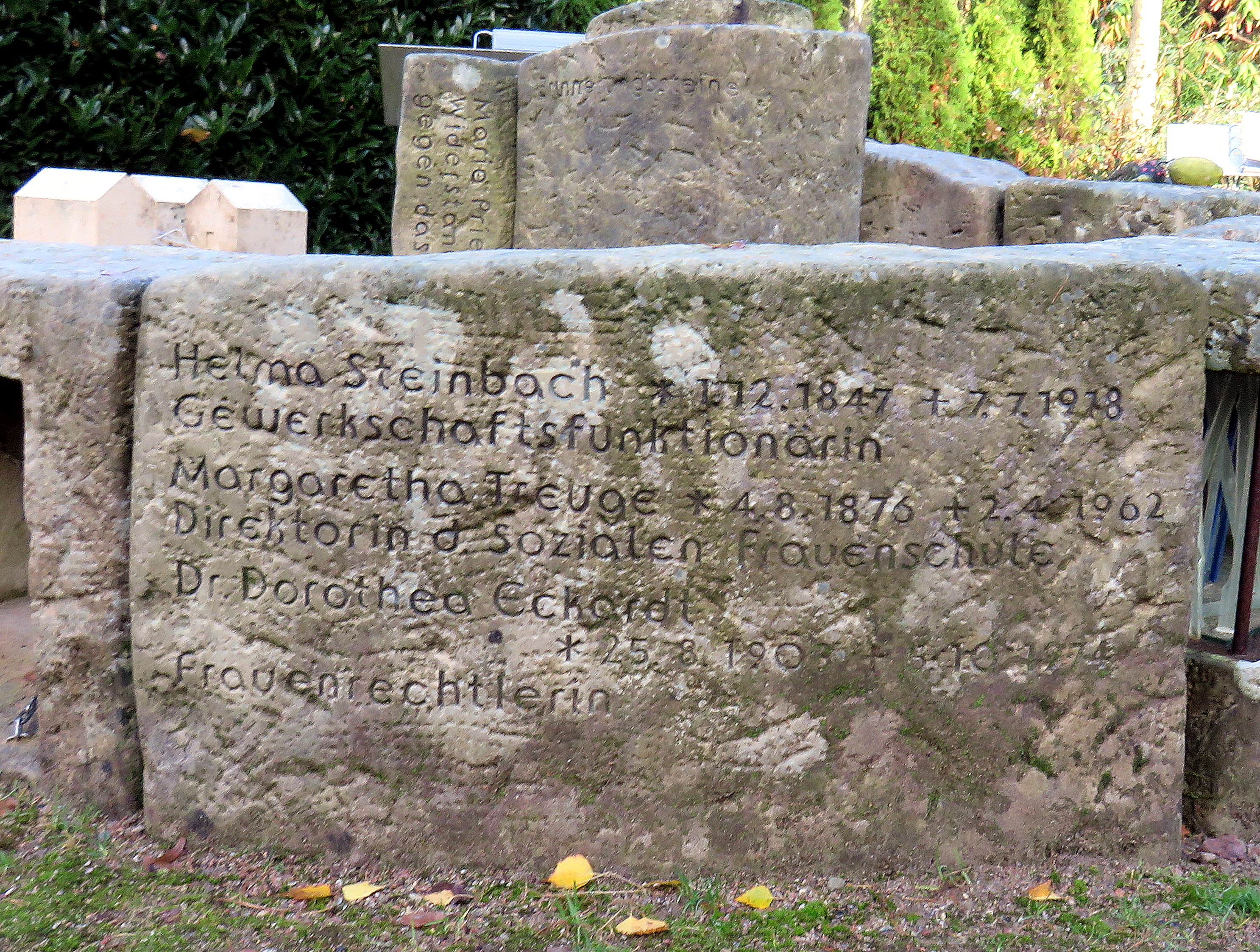 Gedenkstein für Helma Steinbach, Margareta(e) Treuge sowie Dorothea Eckardt in der Erinnerungsspirale im Bereich des Gartens der Frauen auf dem Ohlsdorfer Friedhof in Hamburg-Ohlsdorf.